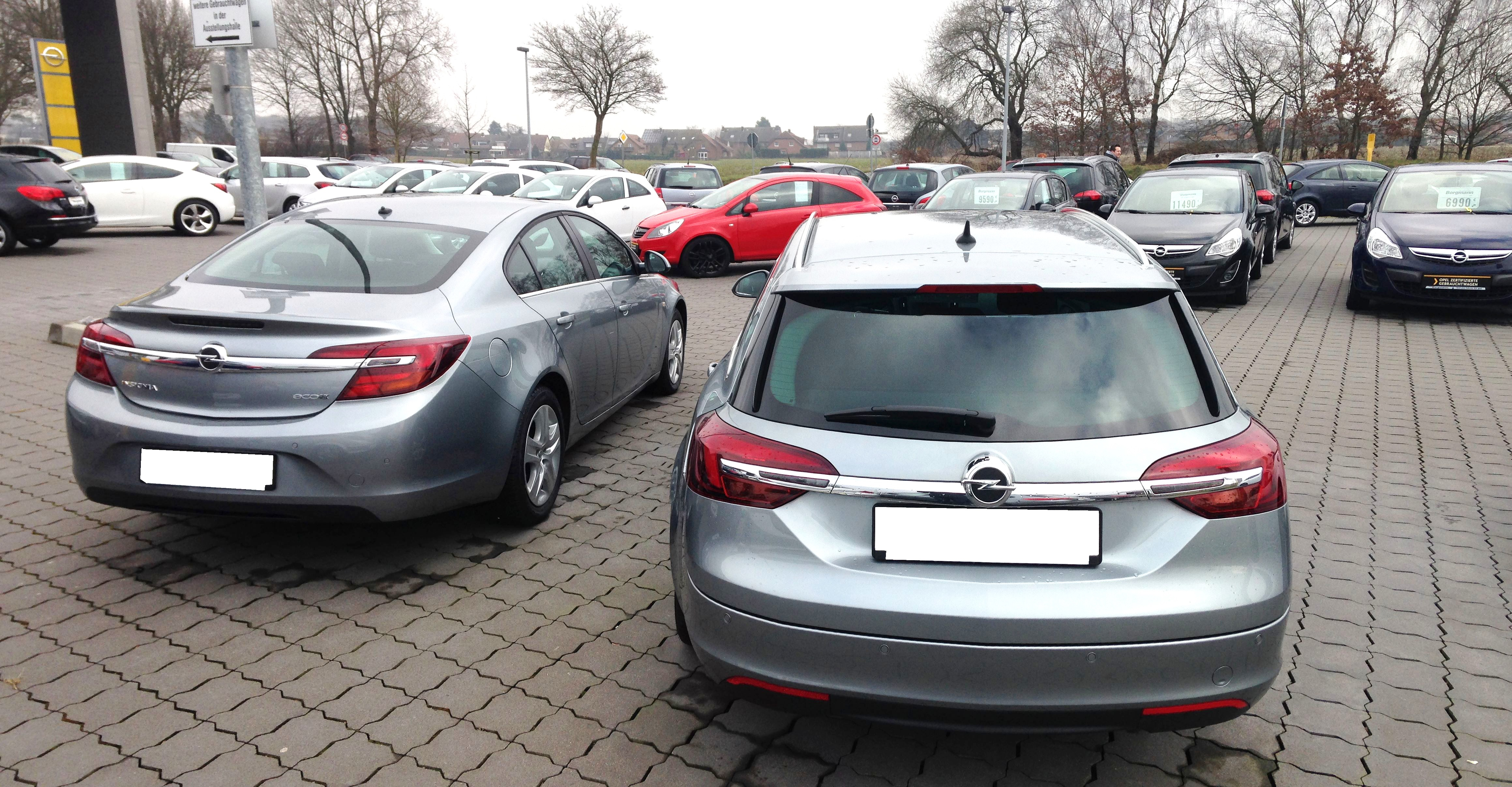 Opel Insignia Facelift - Heckansichten Stufenhecklimousine (links) und Kombi [Sports Tourer] (rechts)